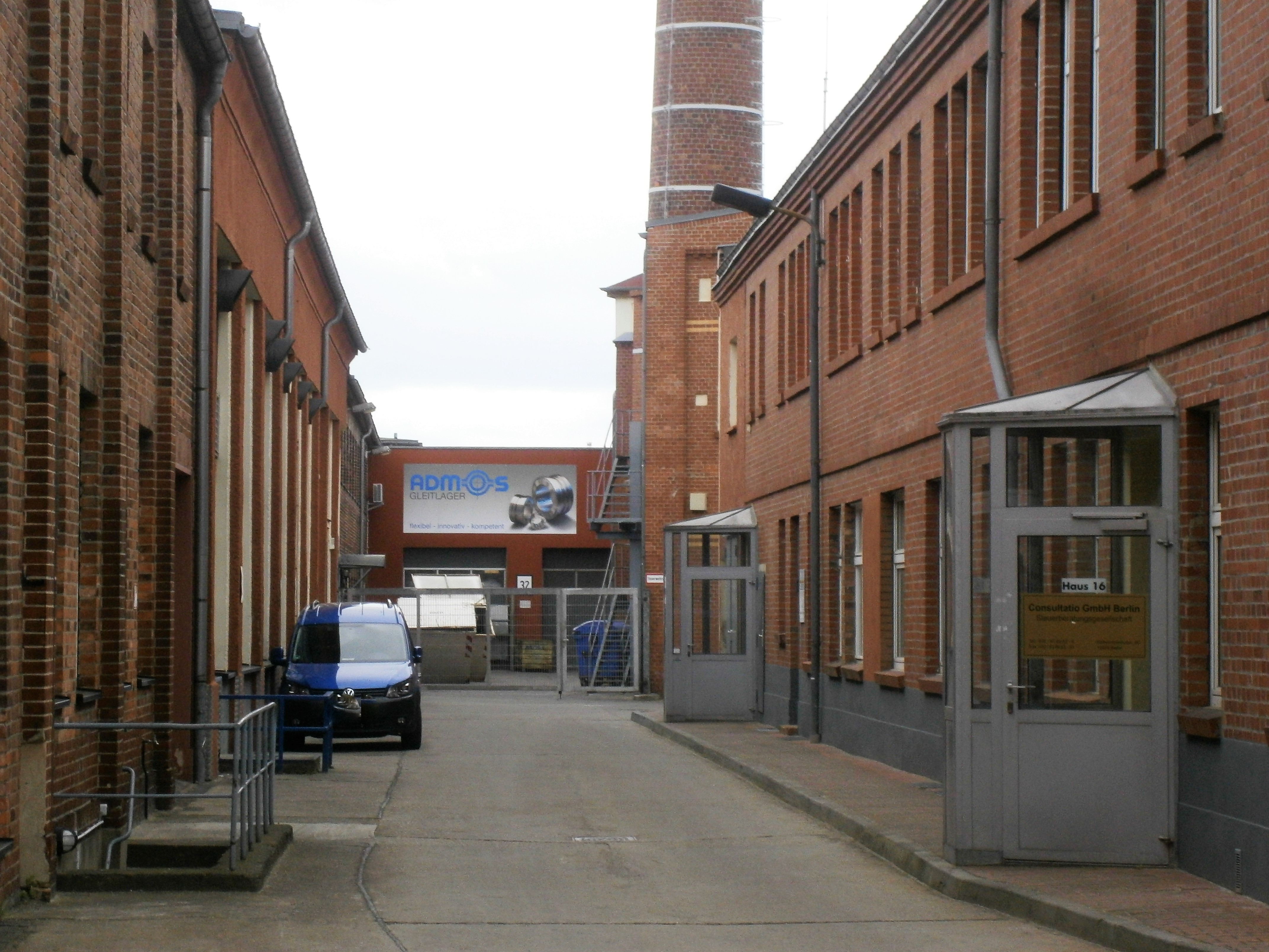 Wilheminenhofstraße ist eine Straße im Berliner Bezirk Treptow-Köpenick. Die Grundstücksfläche der Spreehöfe gehört zum Ortsteil Oberschöneweide. An der Südseite der Straße zur Spree entstanden um 1910 Industrie- und Gewerbeanlagen. Nach dem Mauerfall änderte sich der Charakter der Fläche aus den Industriegebäuden westlich der Edisonstraße wurden der Gewerbepark der Spreehöfe gebildet.